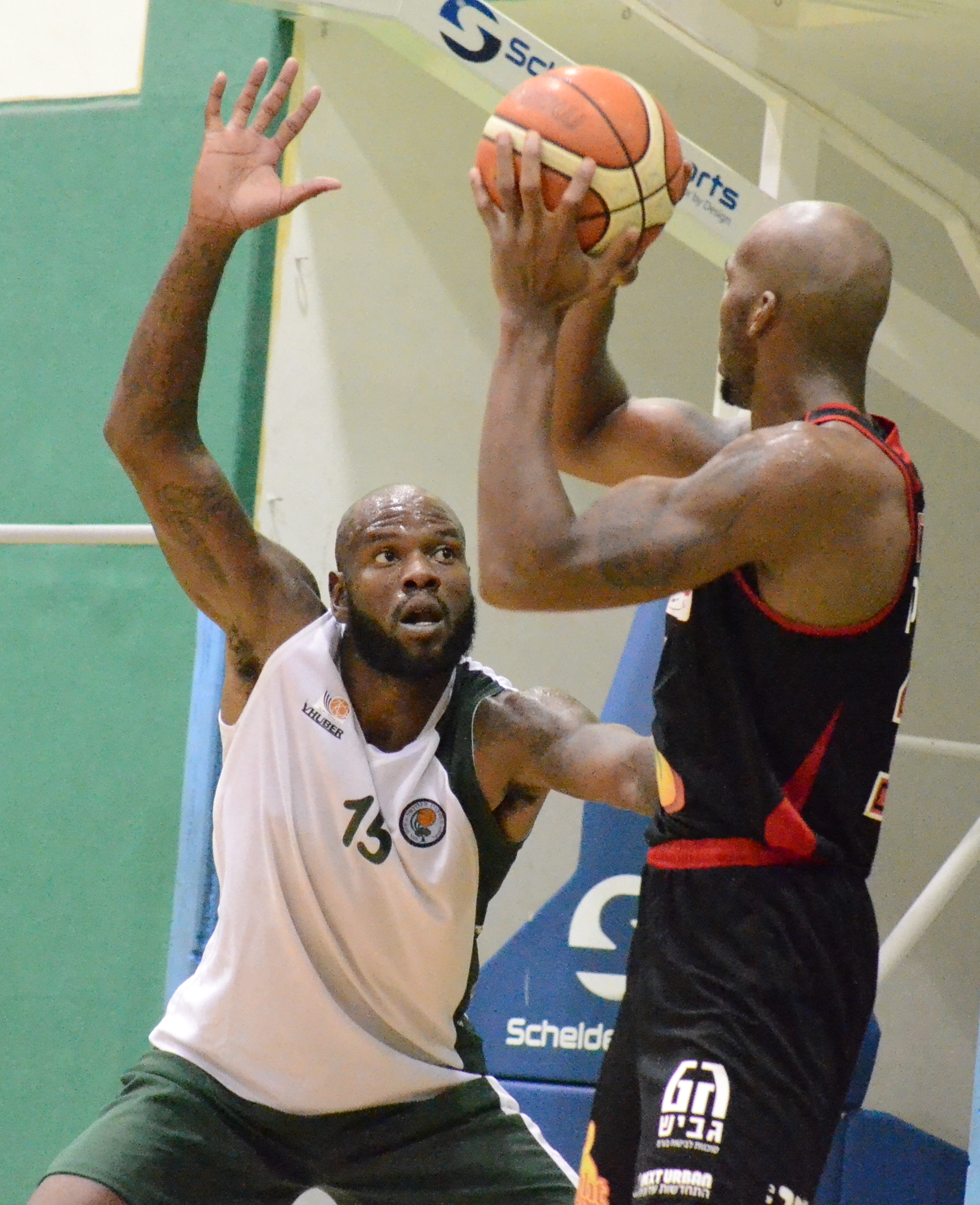 שחקן הפועל כפר סבא דאליס ג'וניור (בלבן) במסגרת הליגה הלאומית 2017